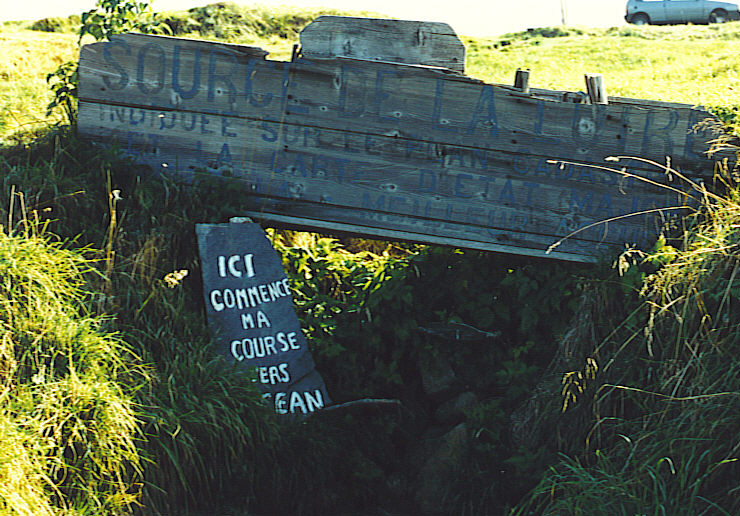 self made